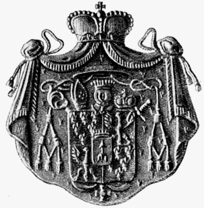 Herb biskupa wrocławskiego Leopolda Sedlnickiego.